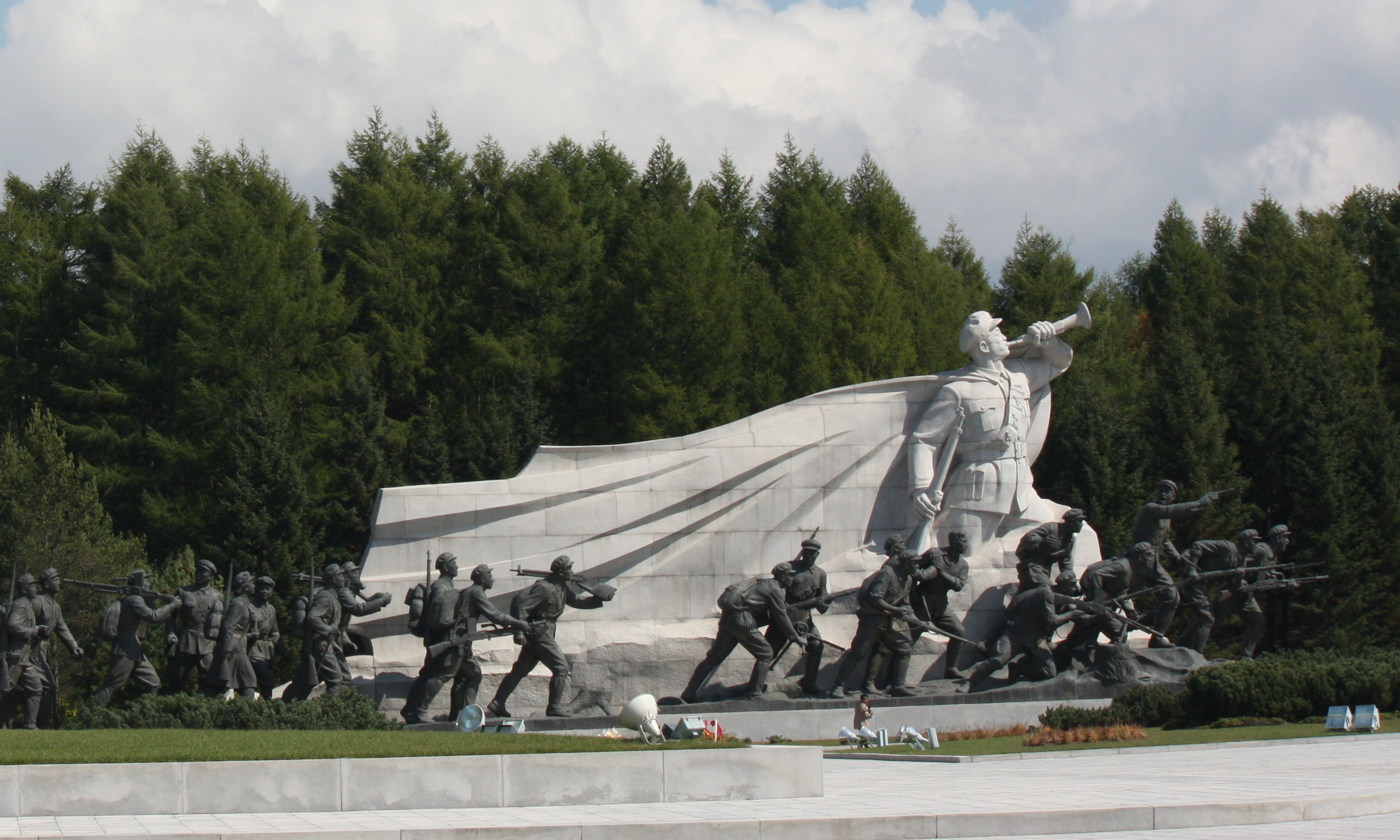 Kim Il-Sung Statue at Samjiyon Grand Monument